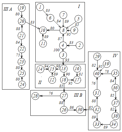 Дендрит построенный для водорослей ДВ России